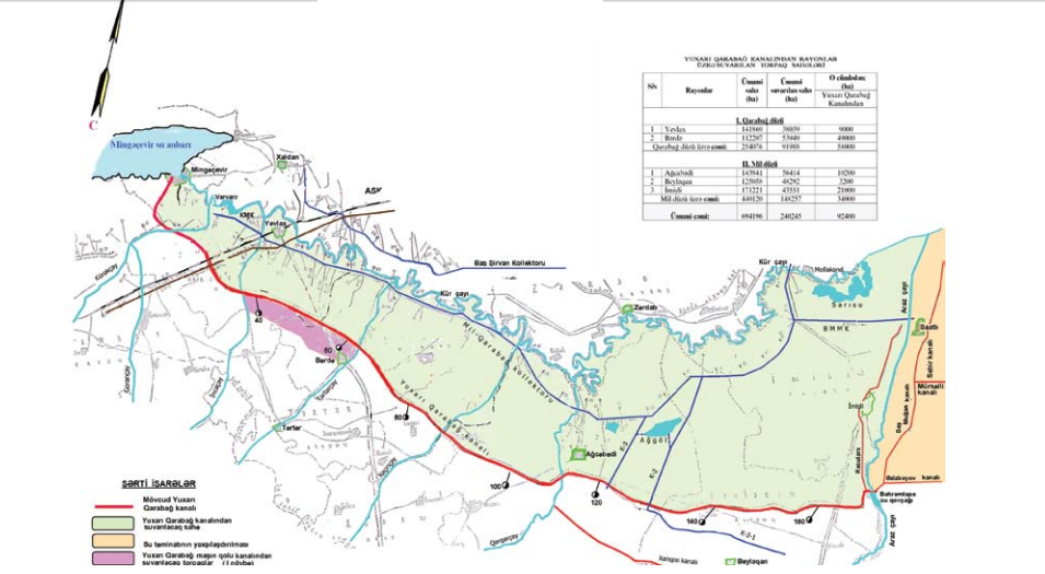 Yuxarı Qarabağ kanalının təsir zonasında ərazinin sxematik planı